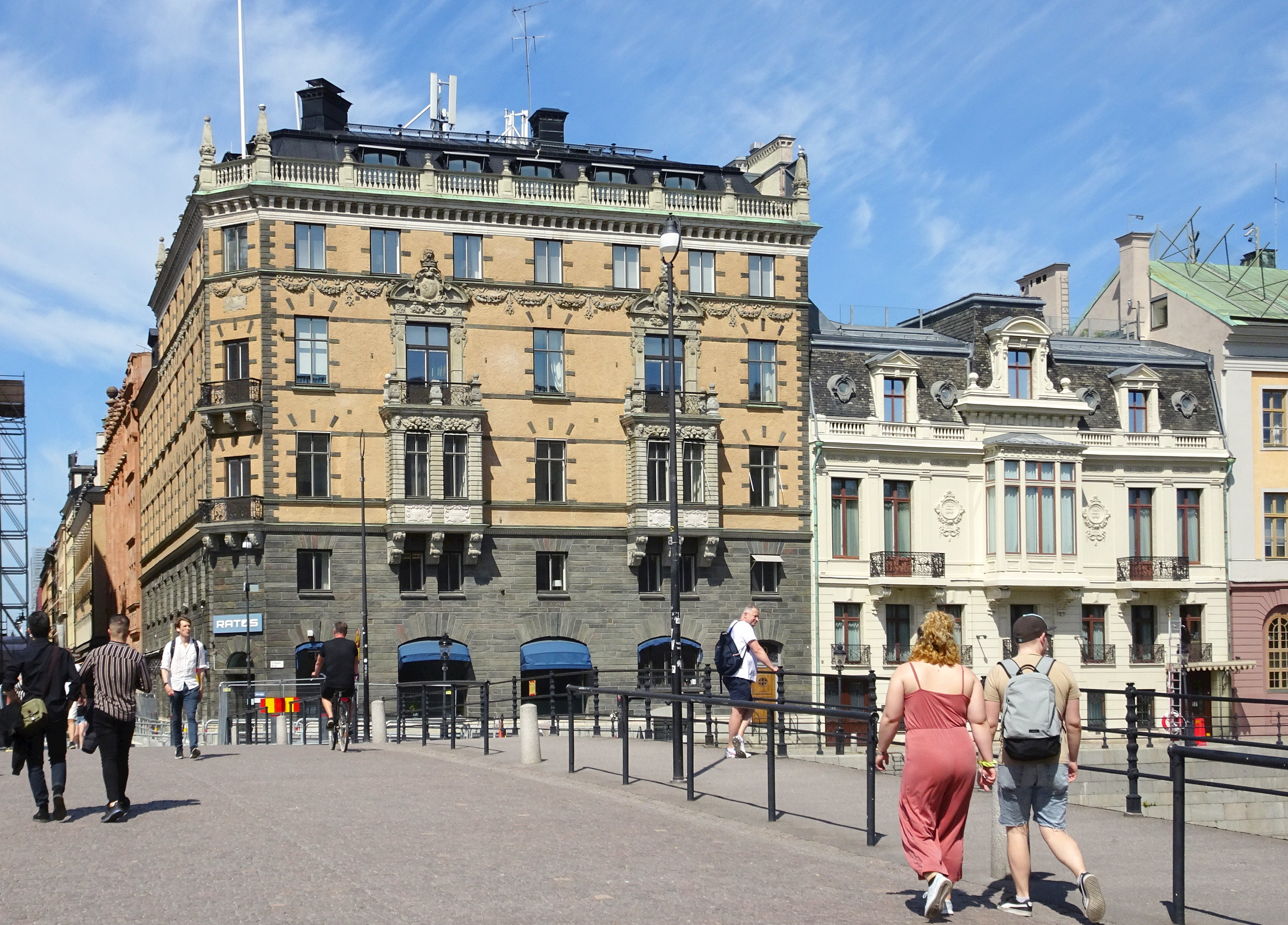 Adelswärdska huset och Sagerska huset sedda från Riksbron